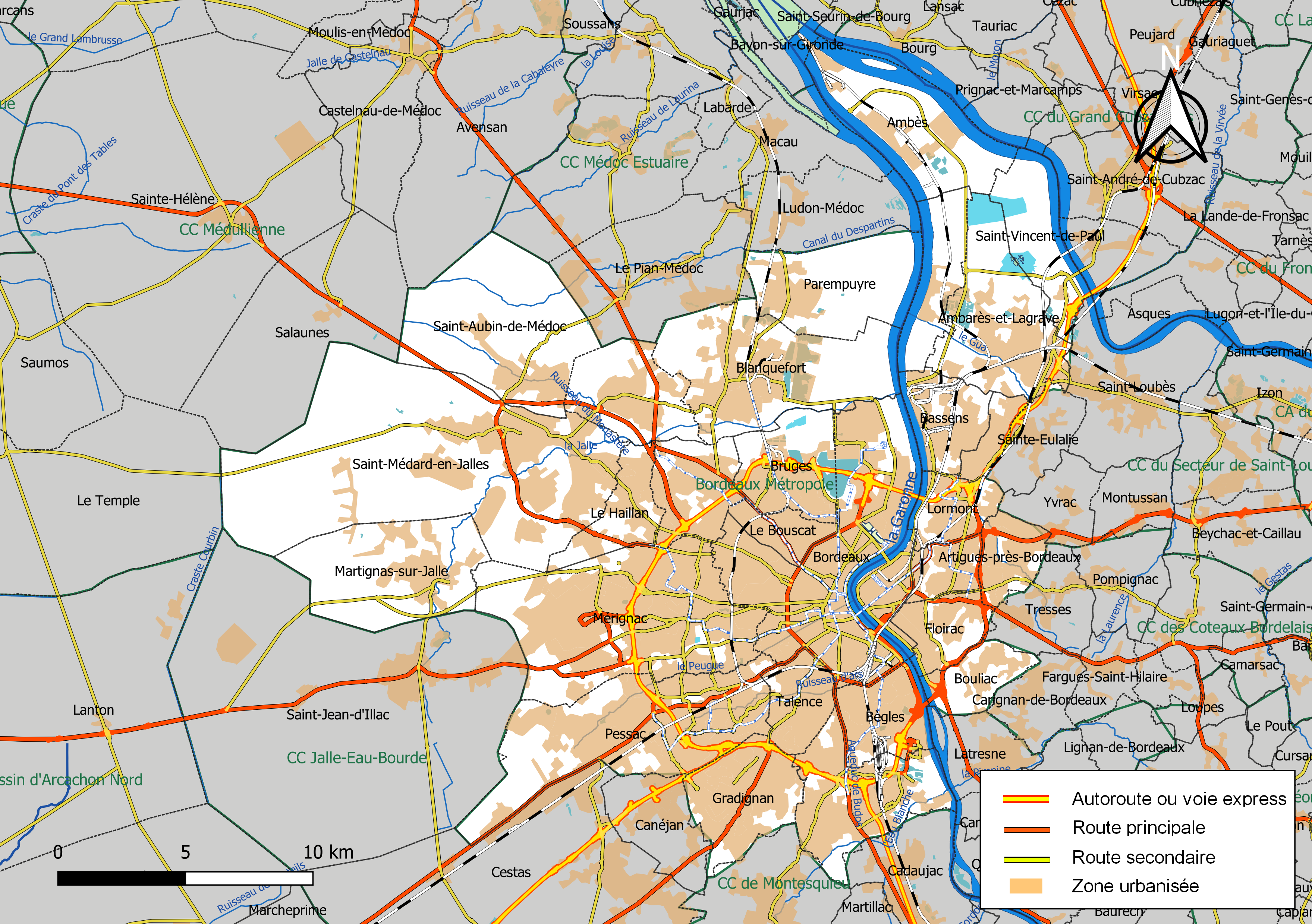 Carte géographique de l'intercommunalité Bordeaux Métropole, département de la Gironde, France. Composition au 1er janvier 2019.